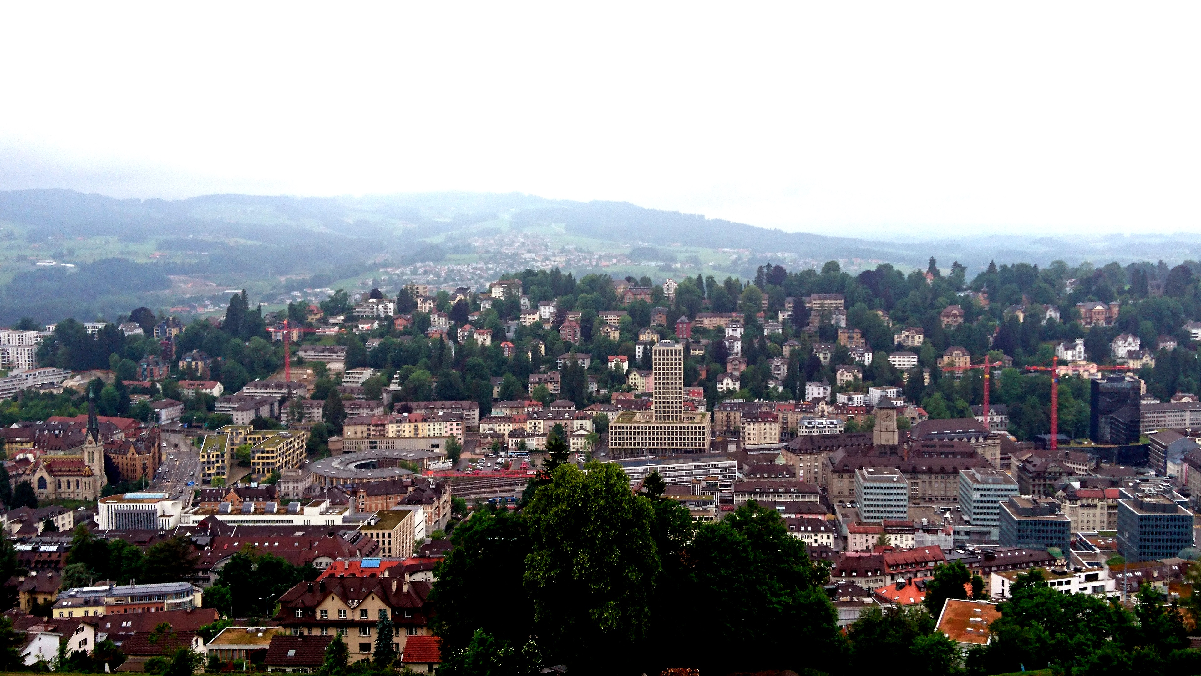 Das Rosenbergquartier, Bahnhofsquartier und ein Teil der Innestadt von St. Gallen vom Bernegghang aus gesehen.